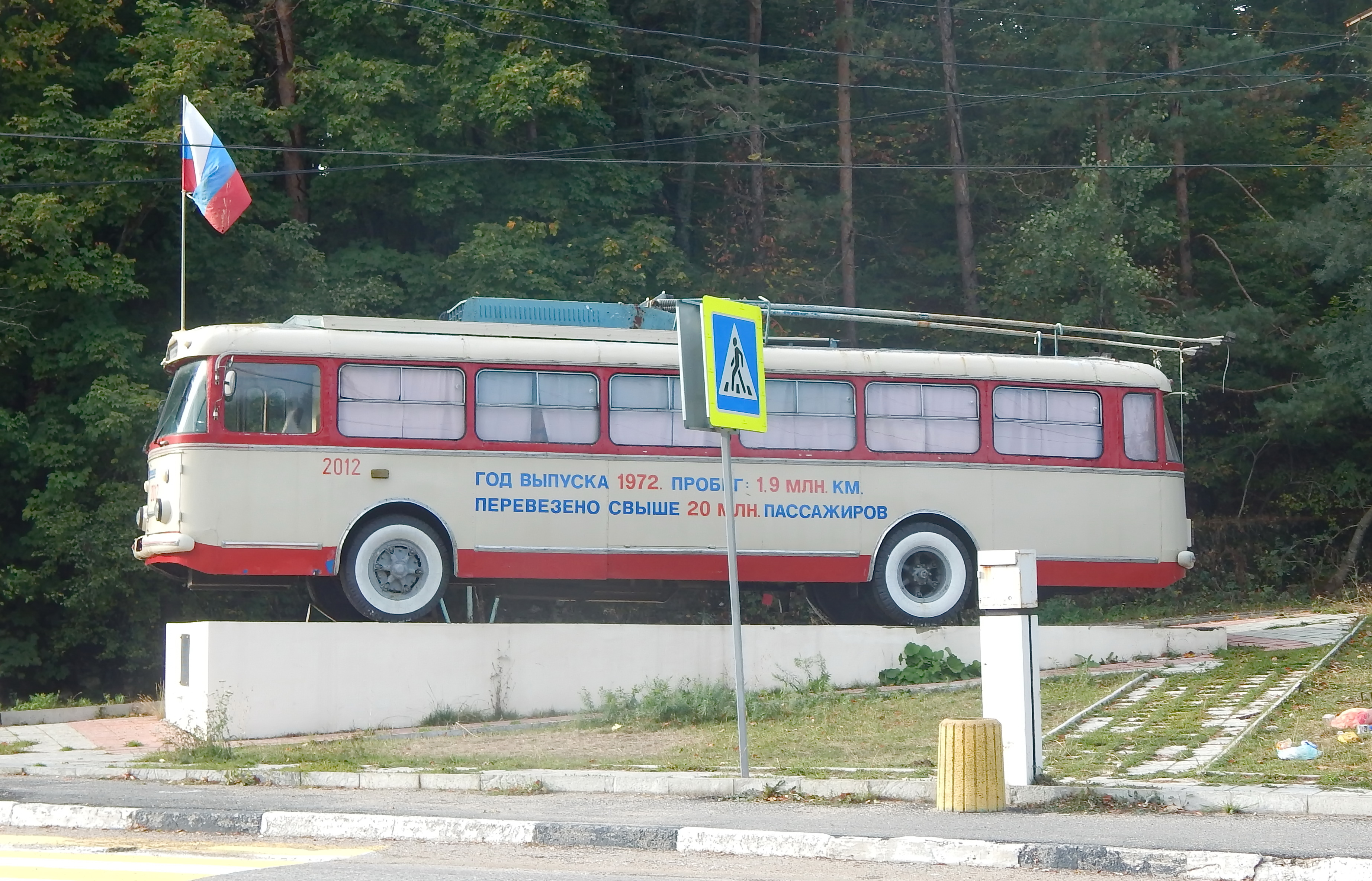 Памятник троллейбусу